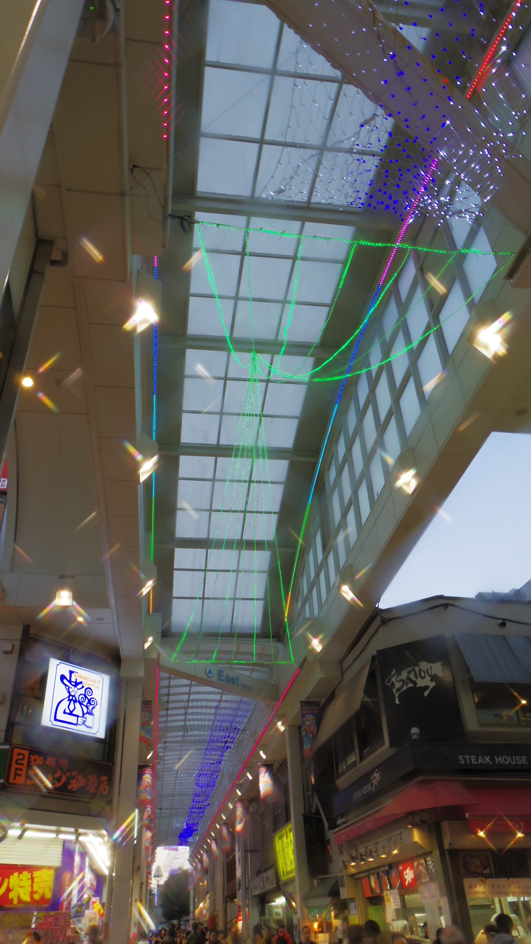 吉祥寺ダイヤ街。「クリスマスフェア」開催中で、イルミネーション装飾が施されている。 写真はWest Zone、Dome近辺（メンチカツでおなじみ「サトウ」が右側に見える）。 2016年11月撮影。